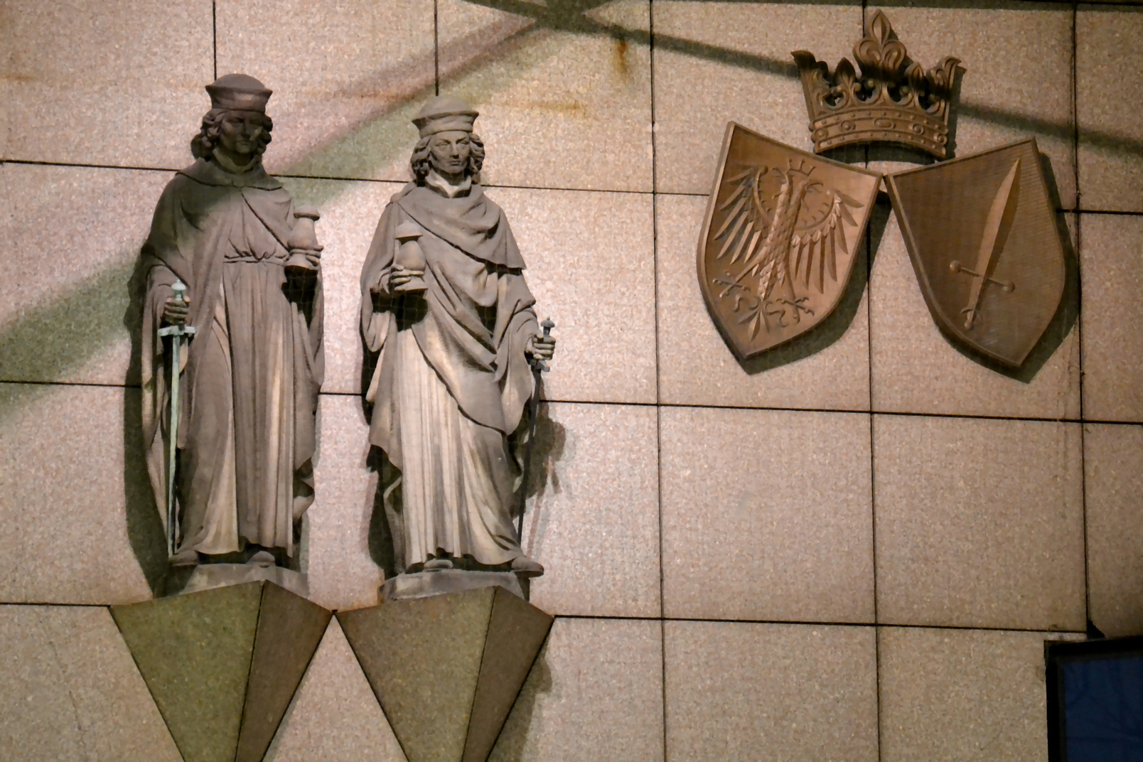 Statuen der Essener Stadtpatrone Cosmas und Damian am Essener Rathaus, erschaffen vom Bildhauer Heinrich König